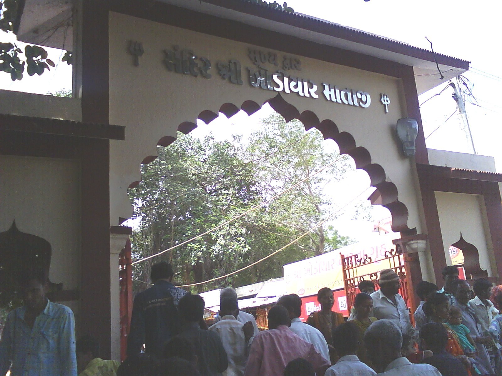 Main Gate of Shri Khodiyar Mandir - Rajapara (Dist.Bhavnagar,Gujarat-India)